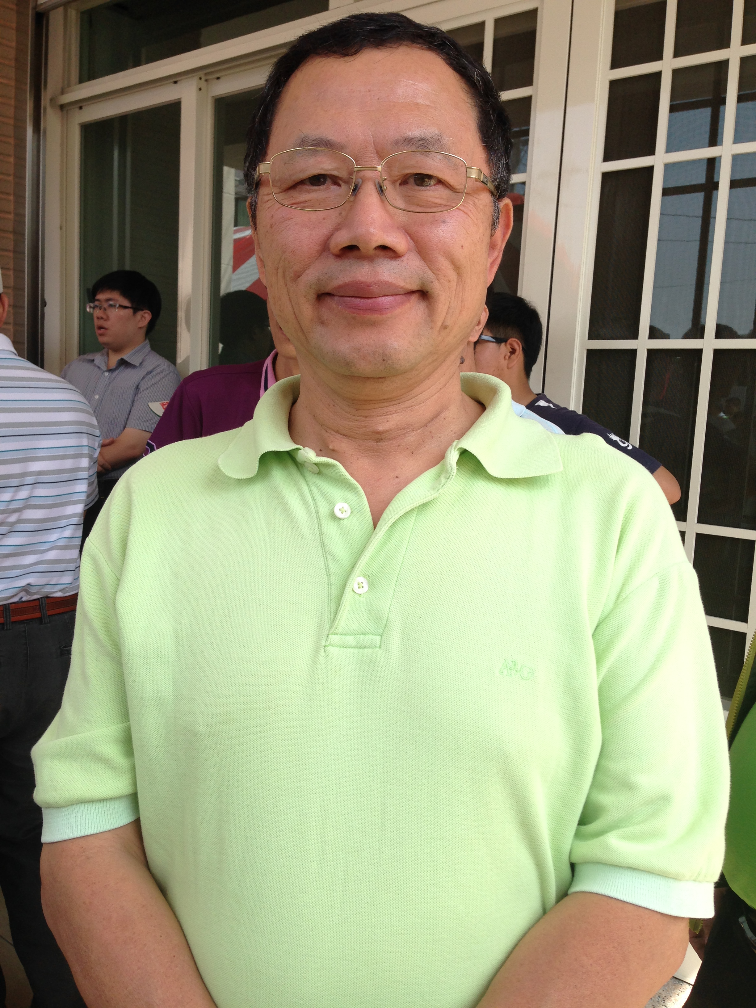 郭俊銘